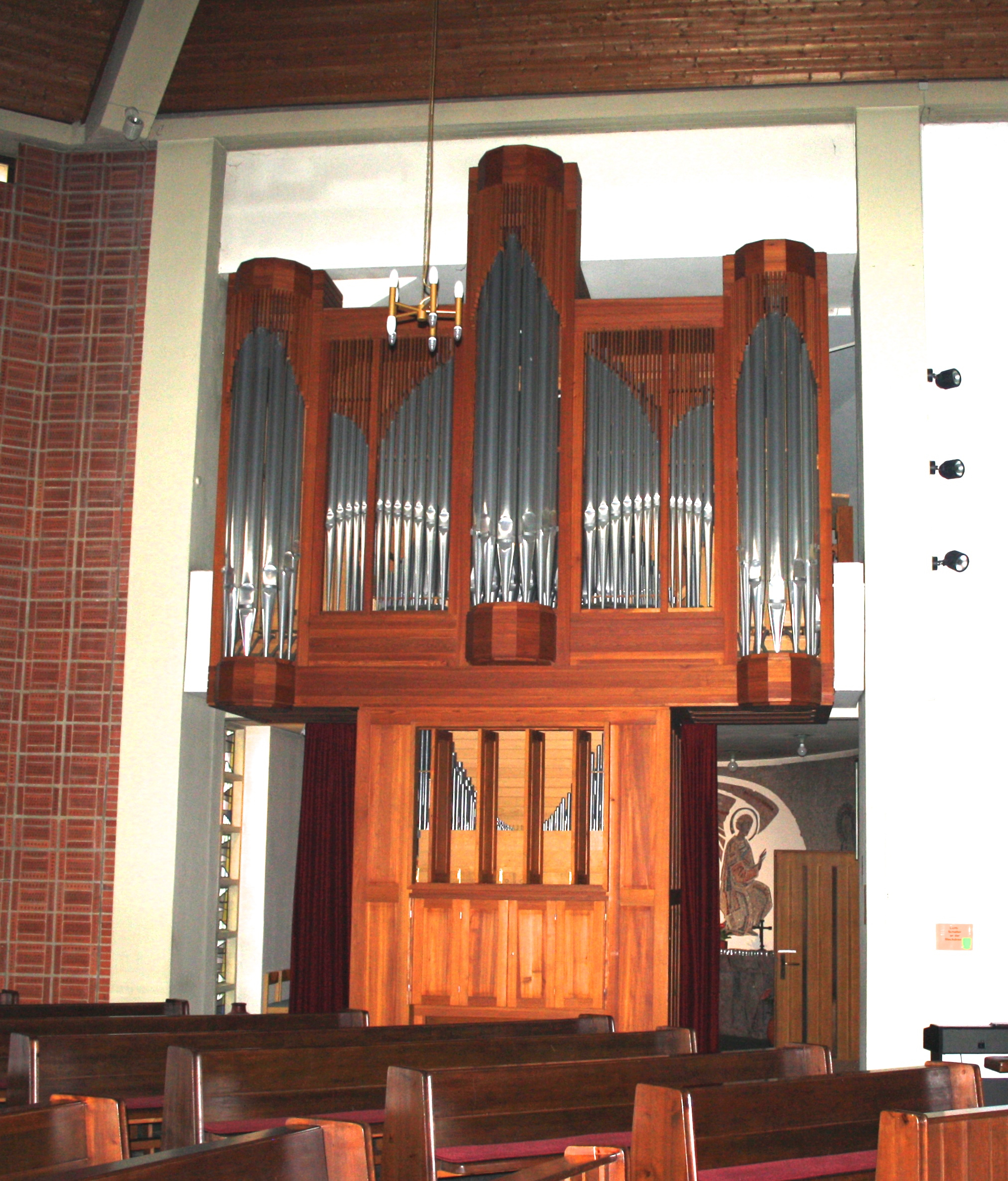 Hillebrand-Orgel in der Heilig-Geist-Kirche Stade